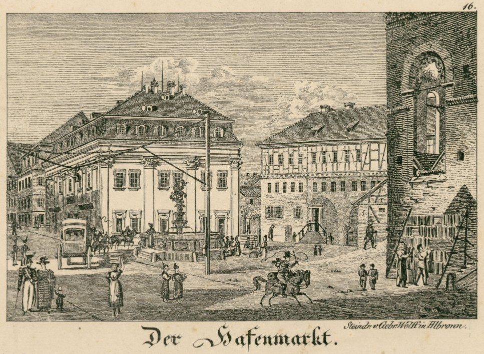 Ansicht Der Hafenmarkt (Hafenmarkt in Heilbronn mit dem Kraichgauarchiv). Aus der Bilderserie Erinnerungen an Heilbronn, Nr. 16